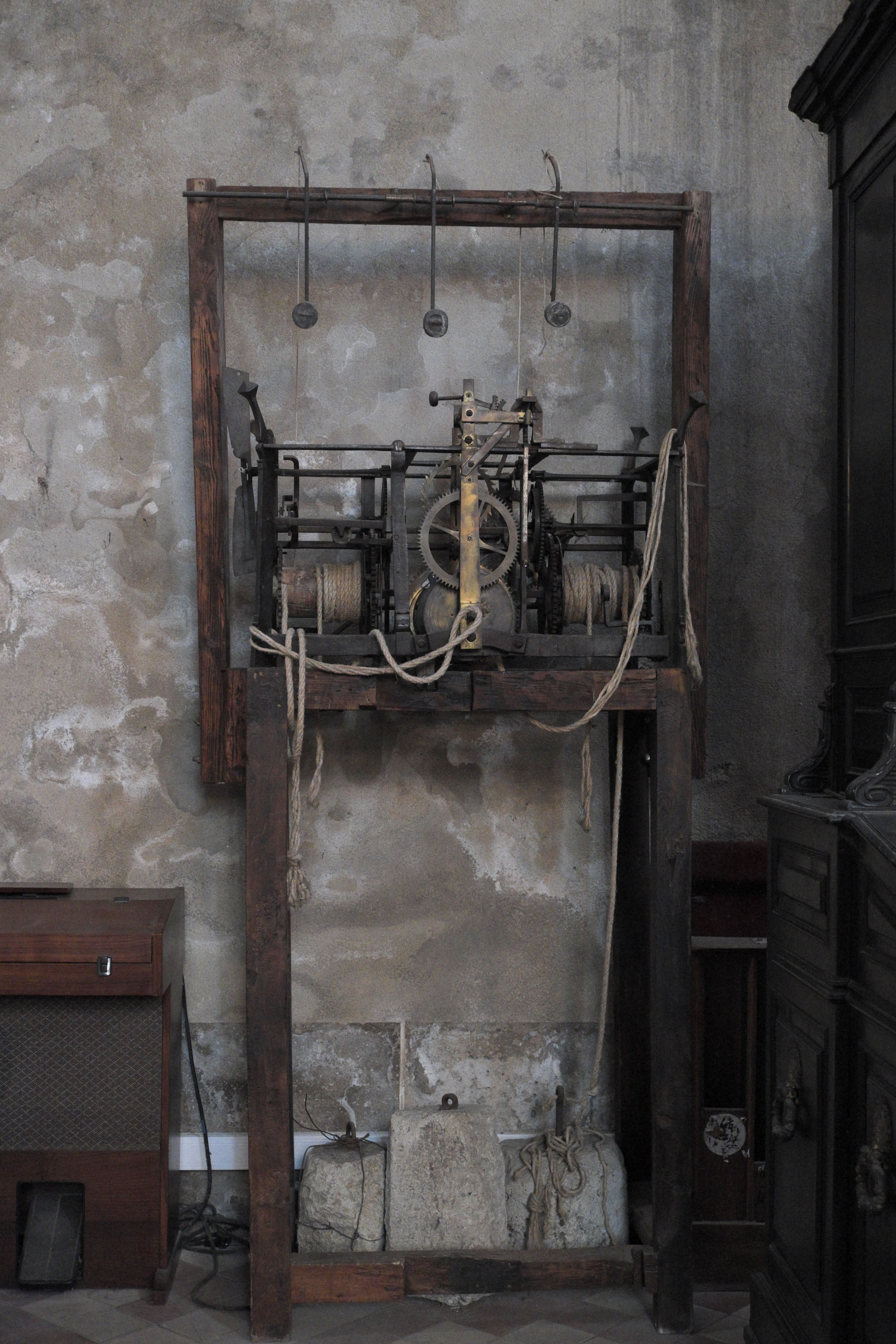 Katholische Pfarrkirche Notre-Dame-de-l'Assomption in La Ferté-Alais im Département Essonne (Île-de-France/Frankreich), Uhrwerk